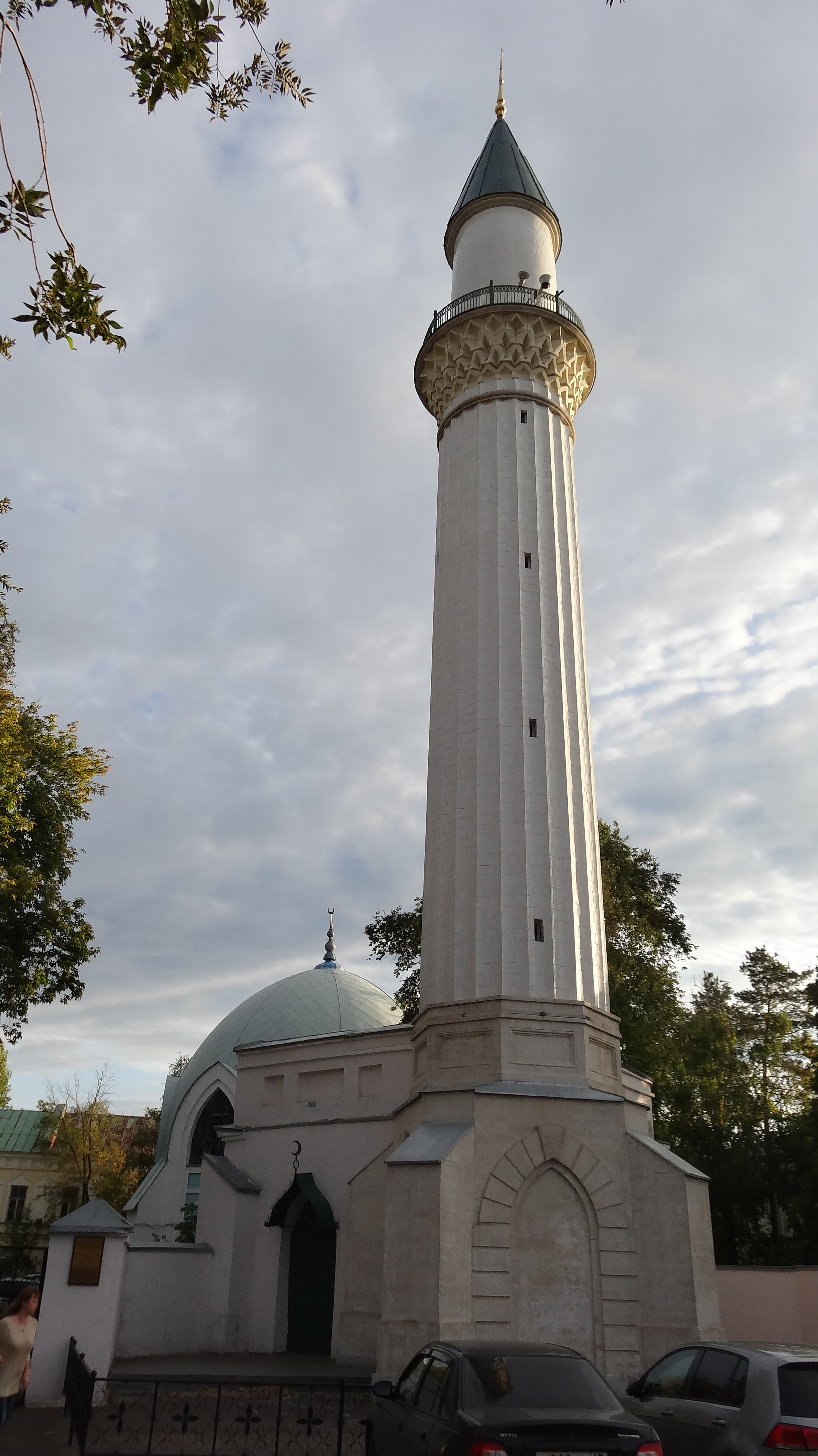 Мечеть с минаретом (Оренбургская область, Оренбург, Парковый пр., 6)